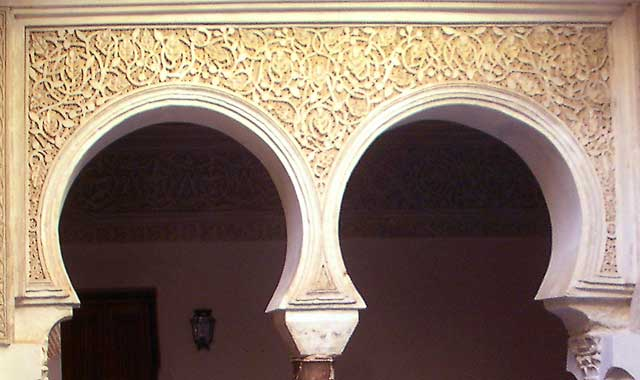 Arcos de herradura procedentes del Monasterio de Las Claras, Tordesillas (Valladolid, España)